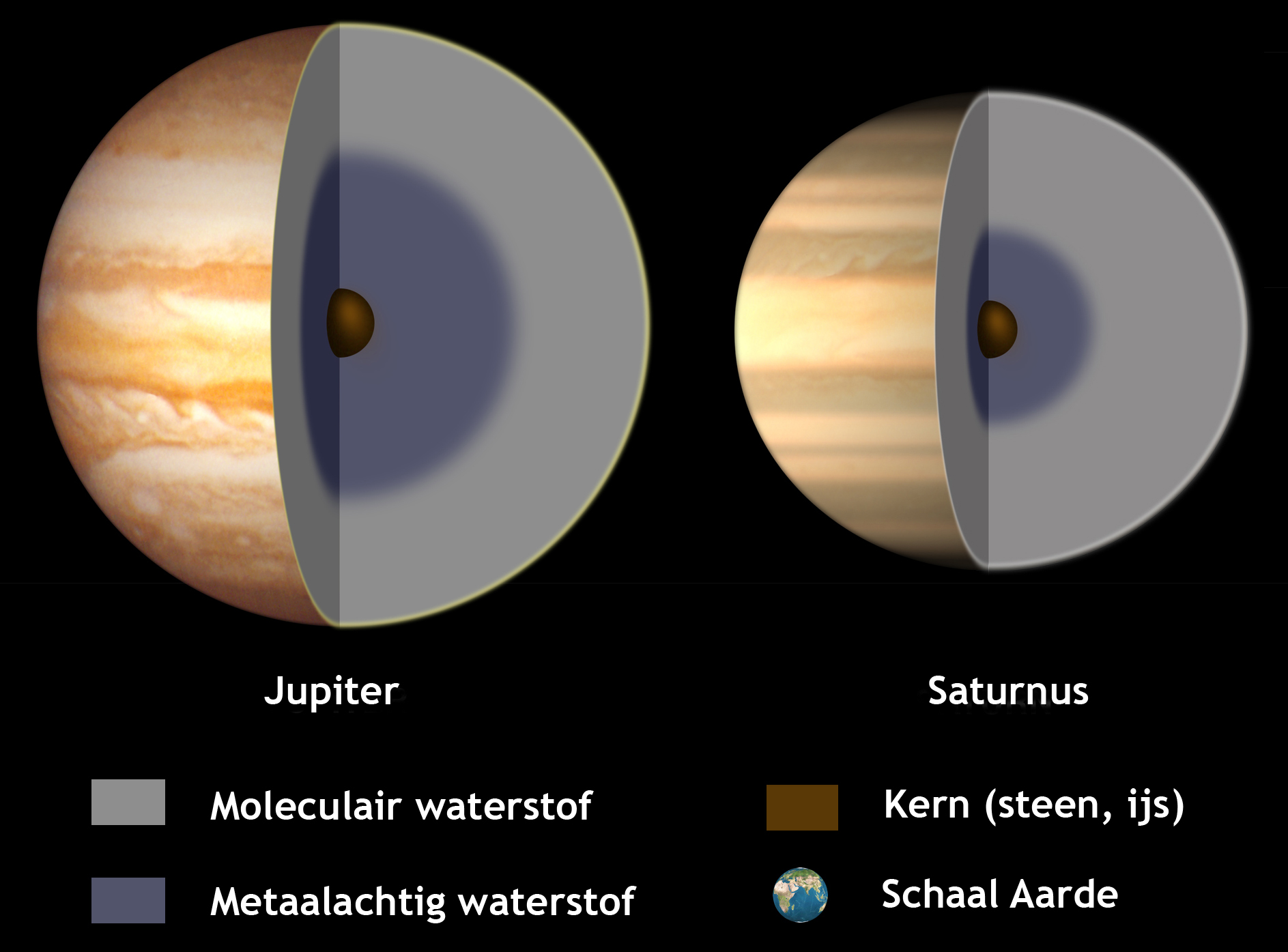 Nederlandse bewerking van de NASA afbeelding op Wikipedia Commons nl::Image:Gas_Giant_Interiors.jpg. In lijn met nieuwe inzichten zijn de afbeeldingen van de ijsreuzen verwijderd en is de legenda vertaald in het Nederlands.